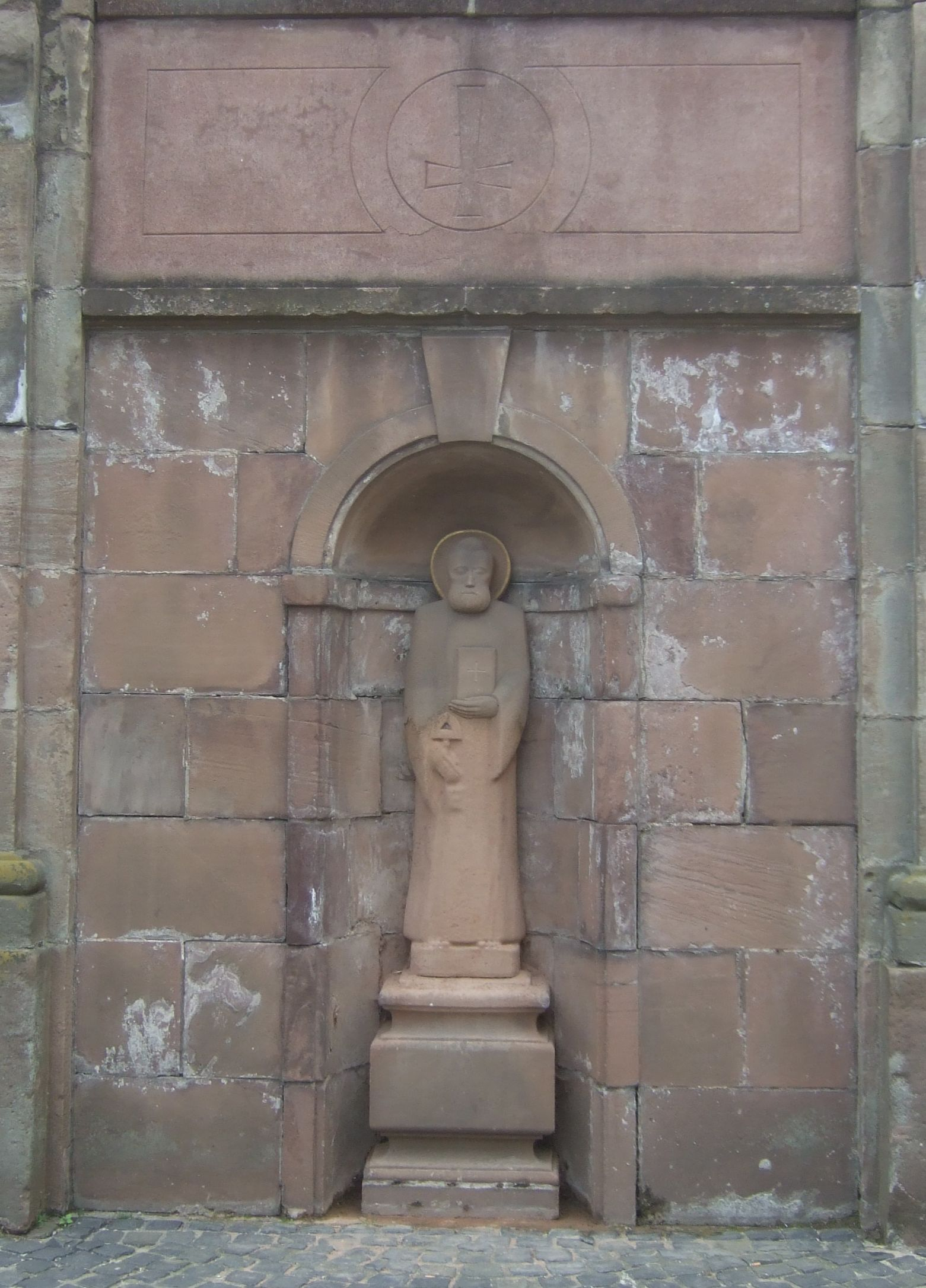 Petrusdarstellung an der Kirche St. Peter in Zell / Mosel